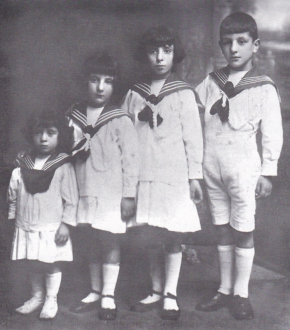 ילדי קאסוטו- נתן מלכה לאה וחולדה- פירנצה 1918